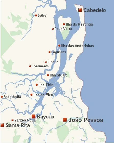 Foz do rio Paraíba do Norte com suas localidades.